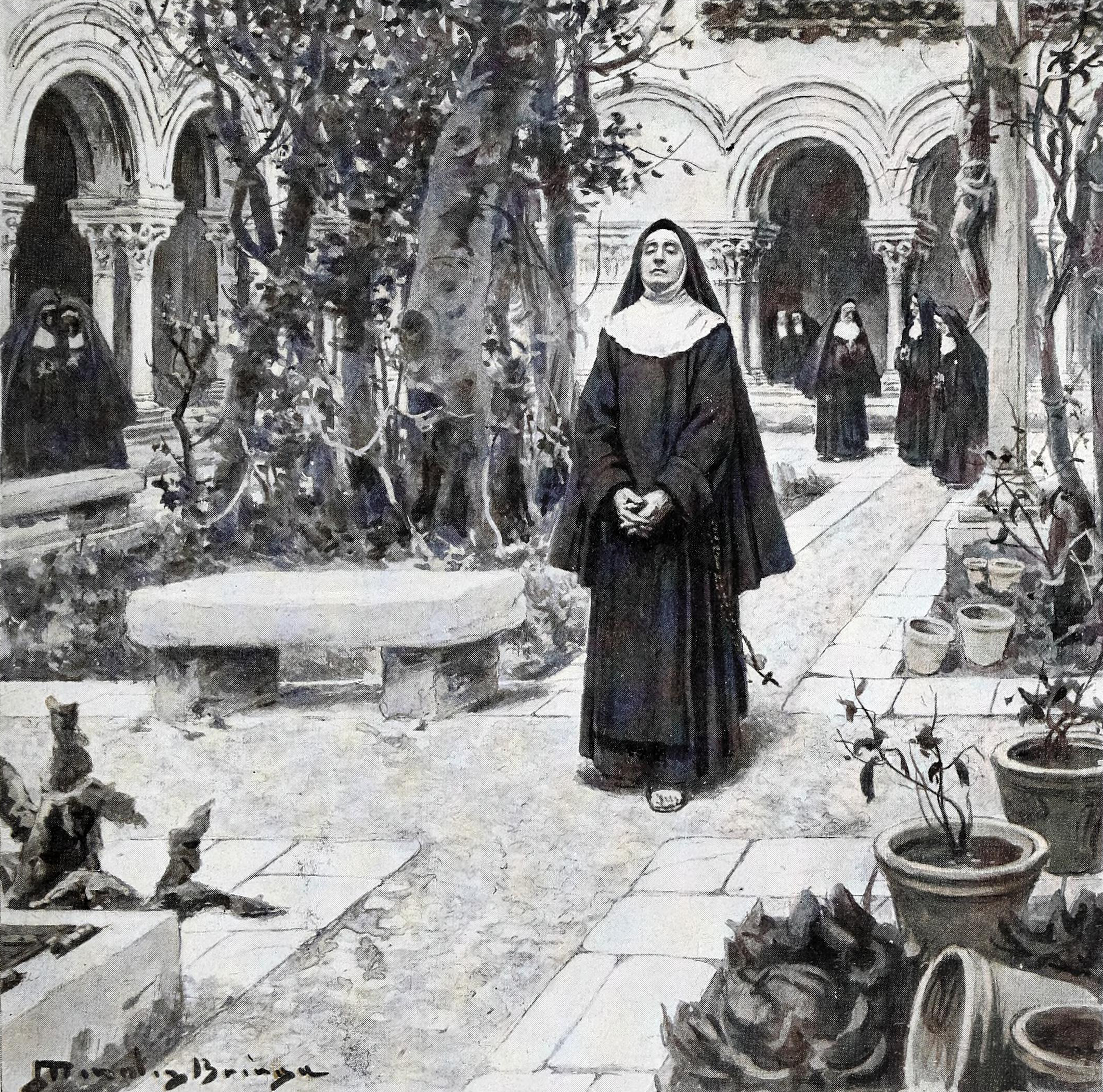 El rosario de coral.